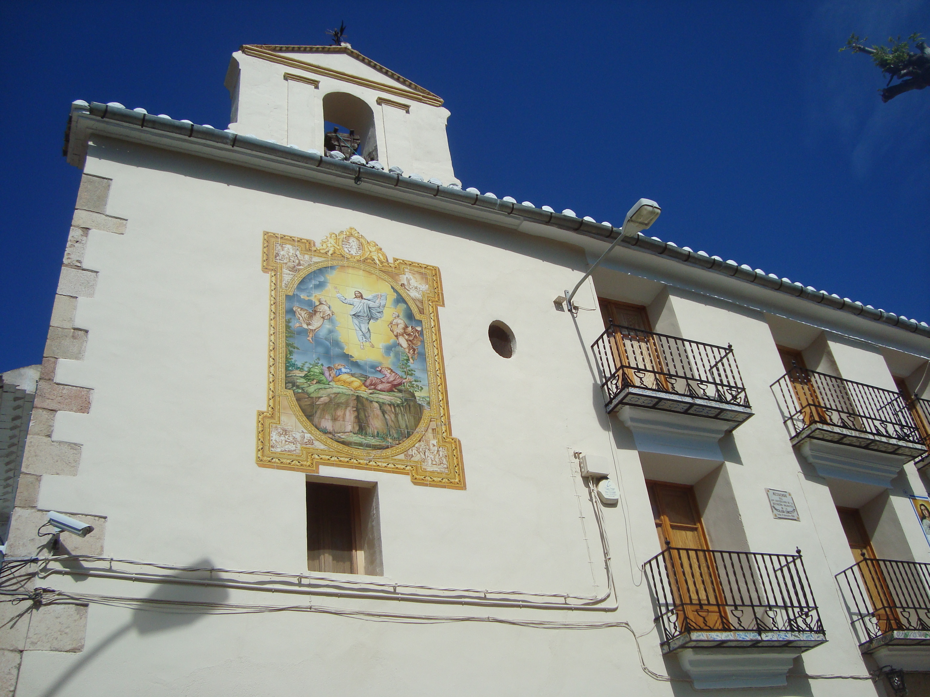 Ermita del Salvador (Onda) 06.084-006.